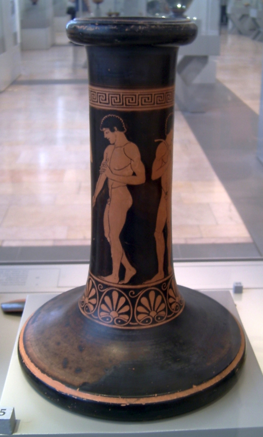 Palästraszene, dem Antiphon-Maler zugeschriebener Dinos-Untersatz, um 490 v. Chr., in Pomarico gefunden